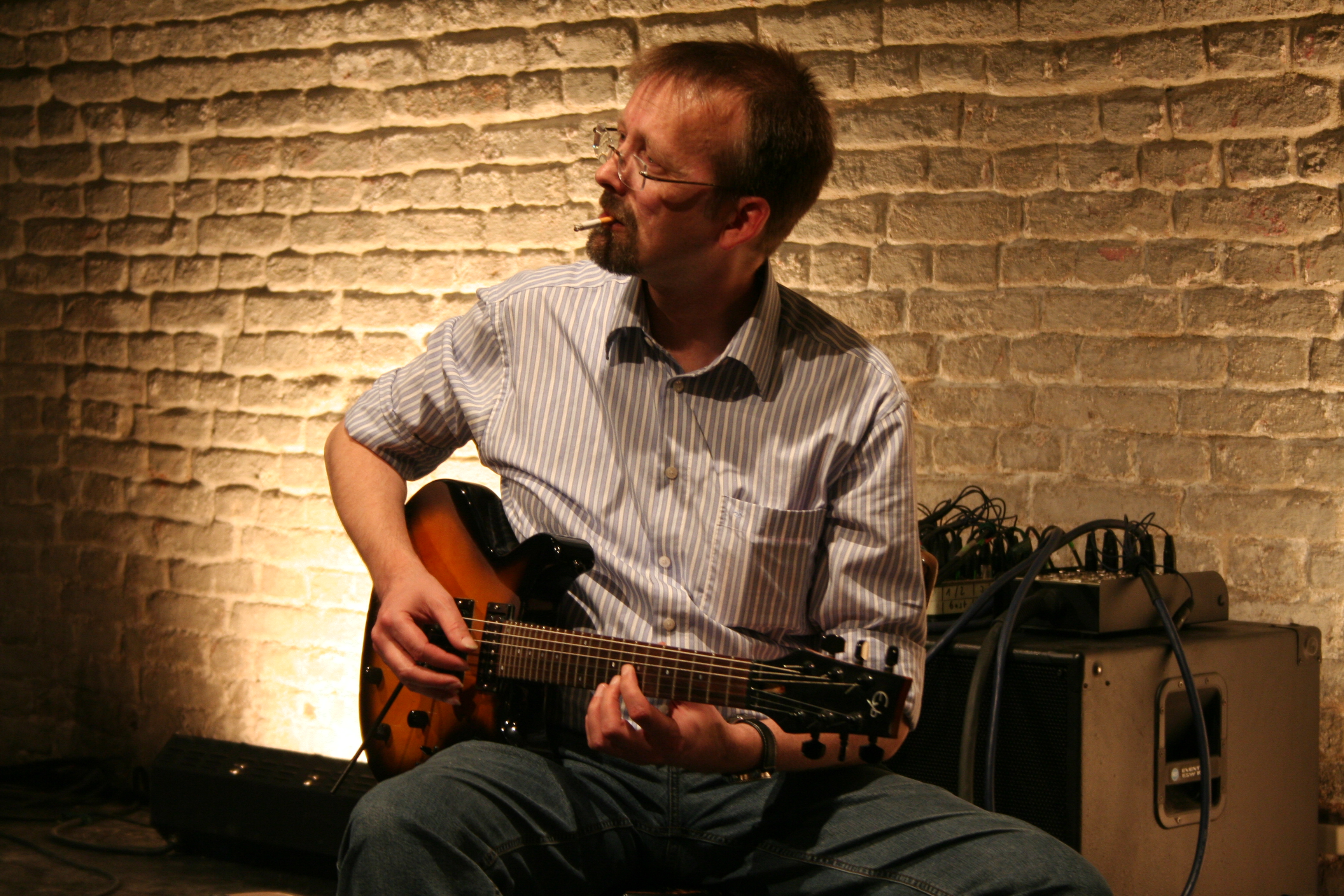 Harald Lillmeyer bei Proben mit Go Guitars am 12. April 2008 in der Münchner T-U-B-E